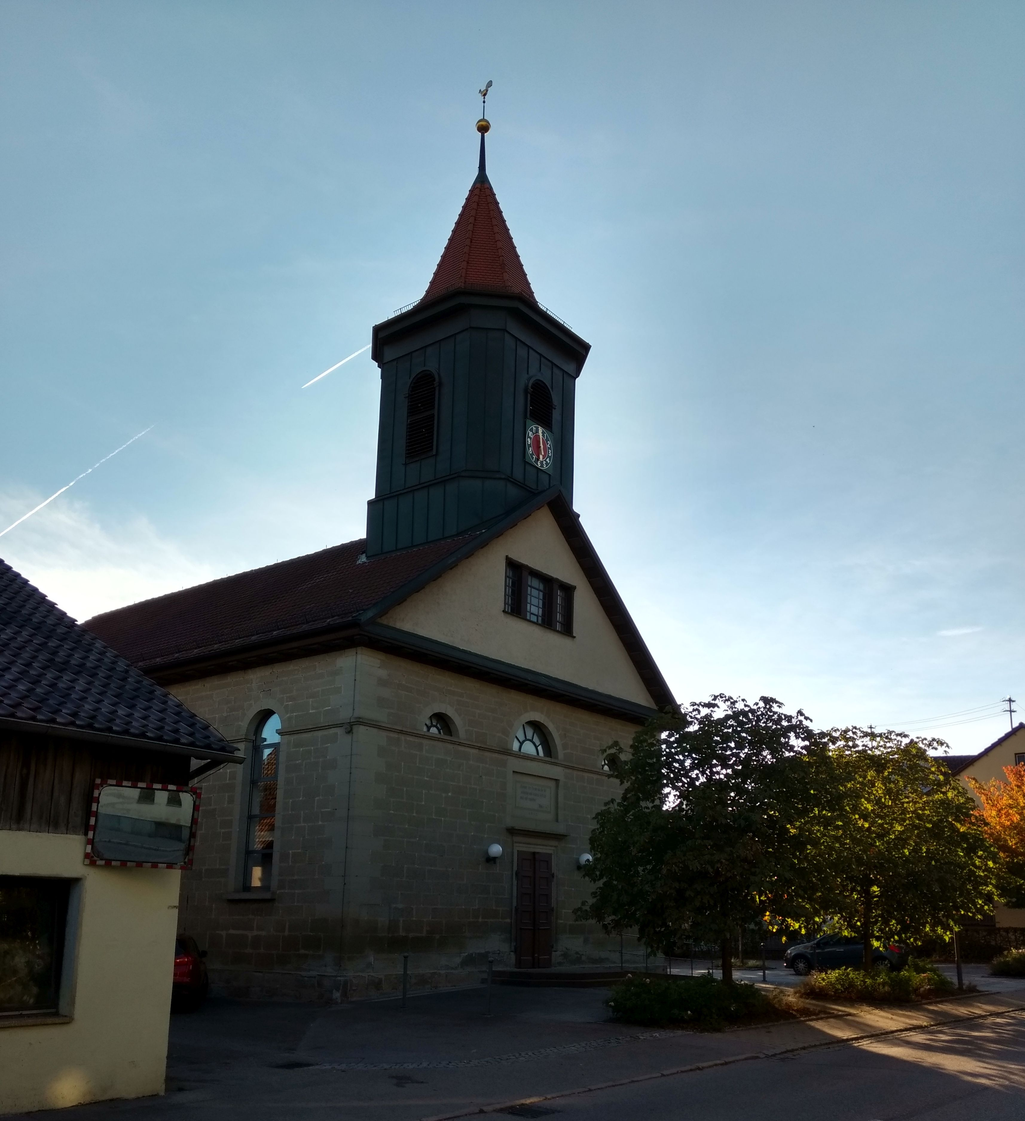 Fichtenberg Kirche